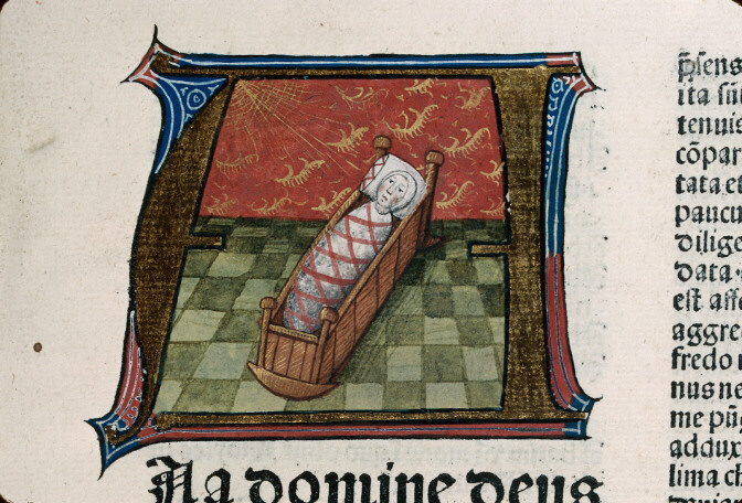 Enfant au berceau - Vocabularius breviloquus Johannes Reuchlin - BM Troyes inc. 080-f. 000a